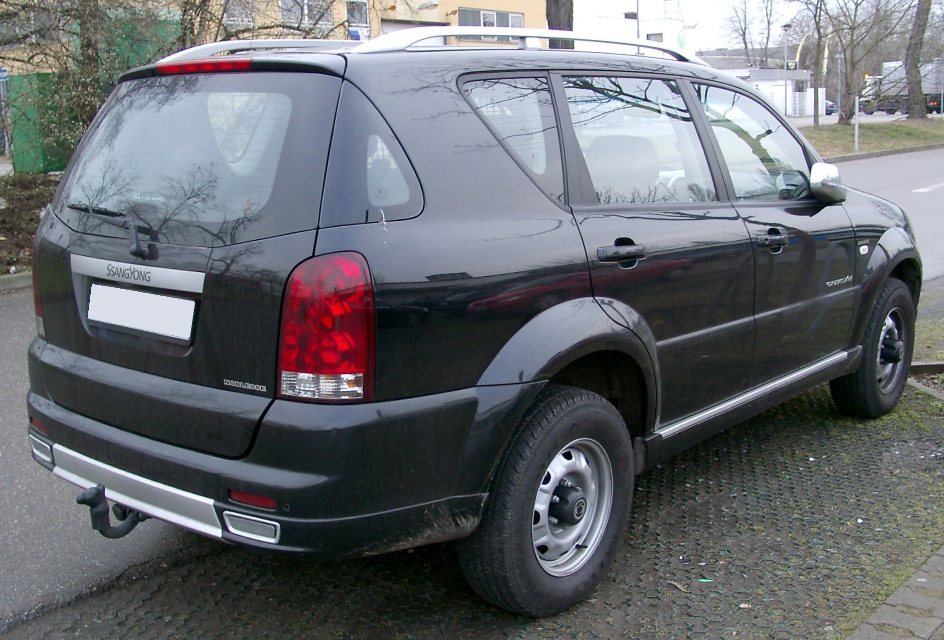 SsangYong Rexton